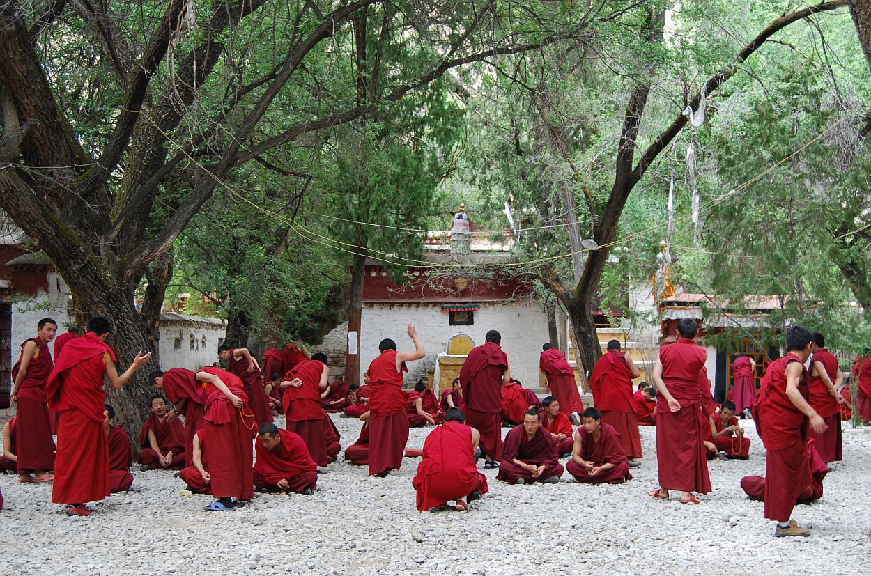 Debattenhof Kloster Sera Tibet